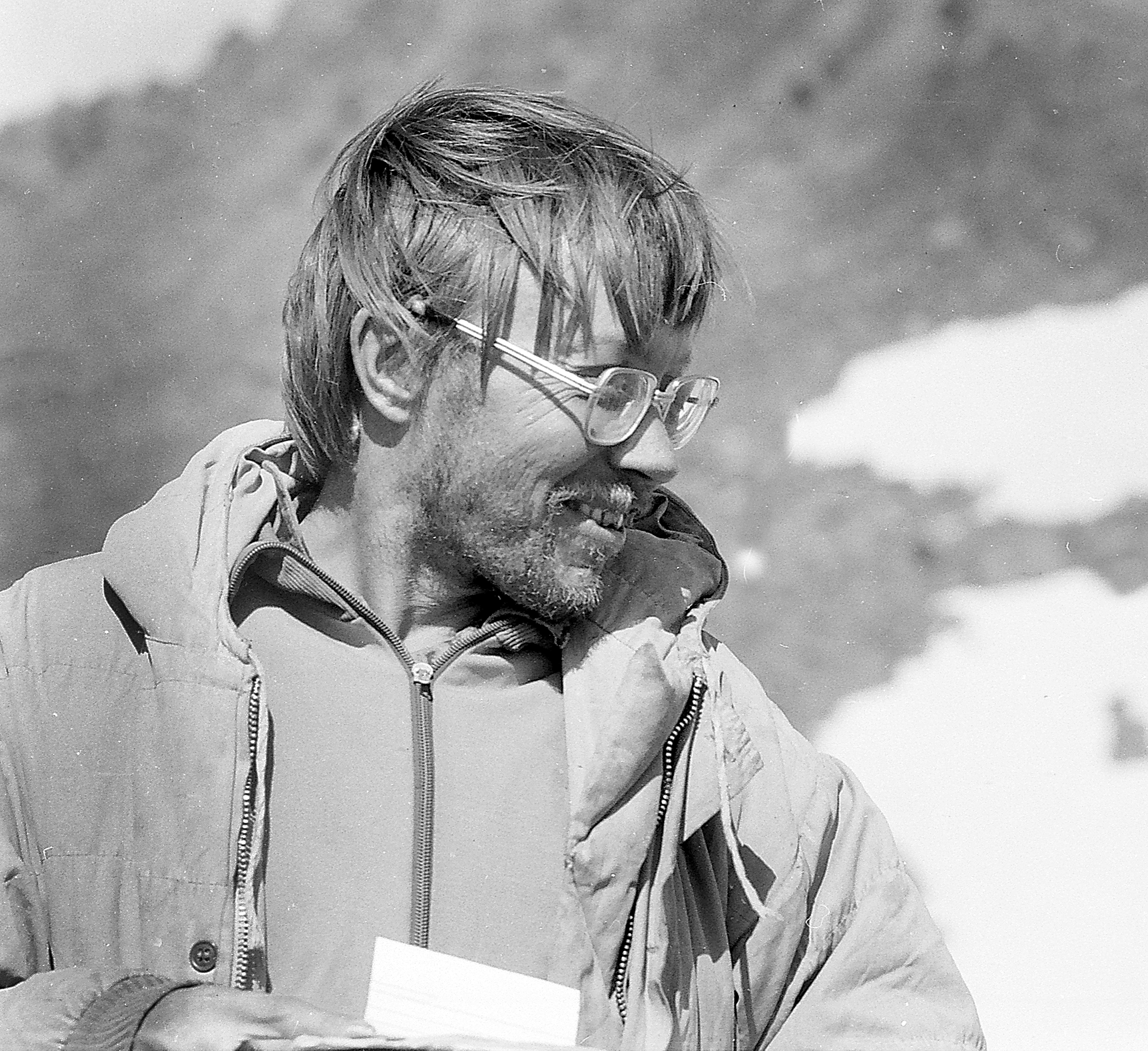 Enn Saar